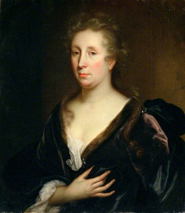 Portrait of Rachel Ruysch (1664–1750)